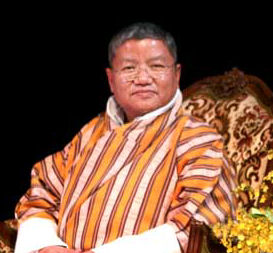 Prime Minister of Bhutan Kinzang Dorji at a meeting in Bangkok, Thailand